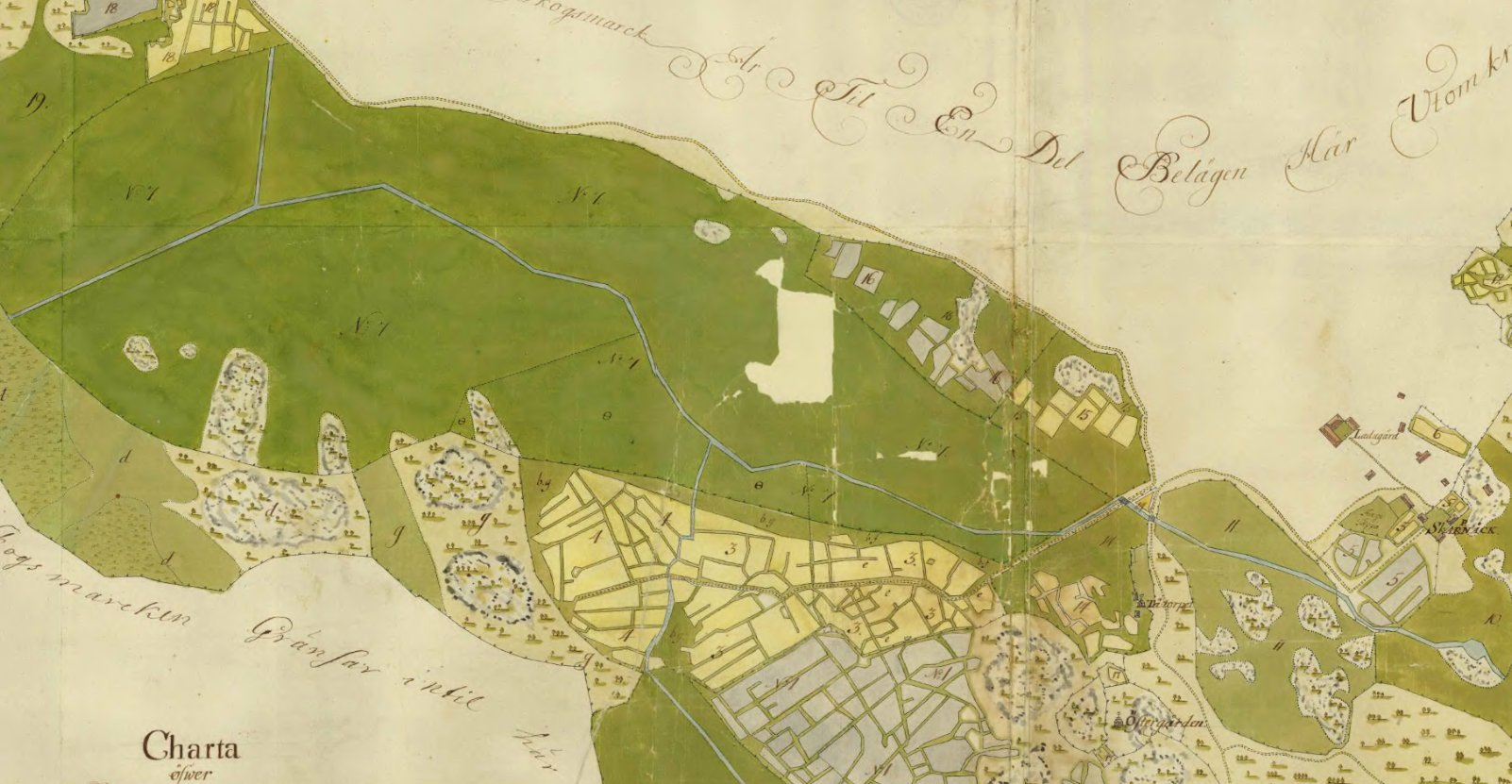 Lantmätare Bodings karta över Skarpnäck 1756